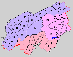 石川県鳳至郡の町村制施行時の町村。